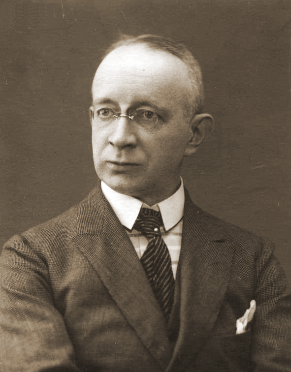 Stanisław Kętrzyński